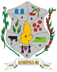 Brasão do Município de Alpinópolis